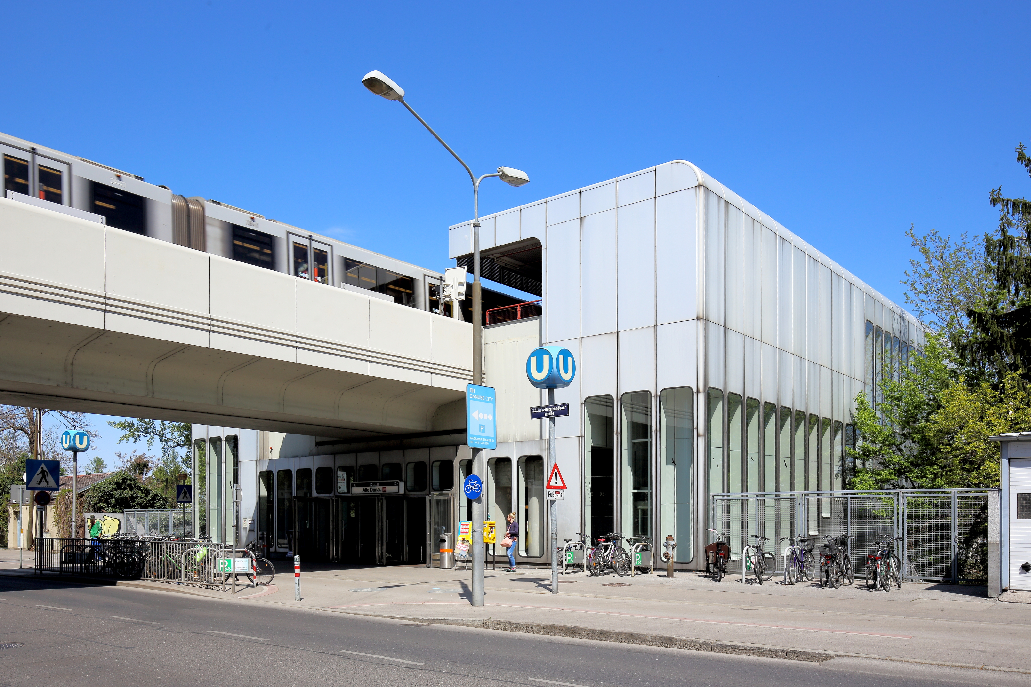 U-Bahn-Station Alte Donau der U1 in der österreichischen Bundeshauptstadt Wien. Die Station wurde im Zuge der U1-Verlängerung am 3. September 1982 eröffnet.